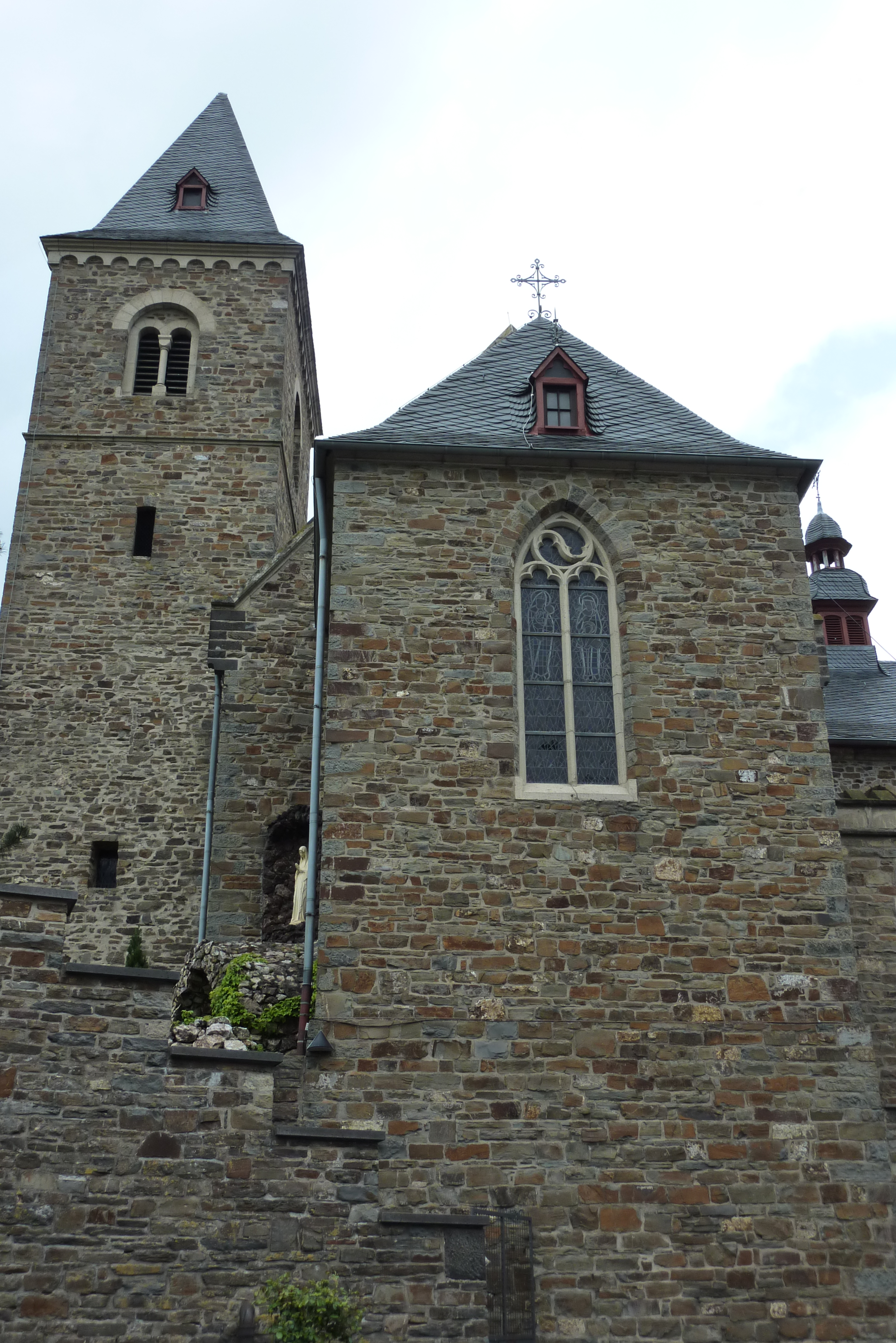 katholische Pfarrkirche St. Kunibert in Hönningen, Turm